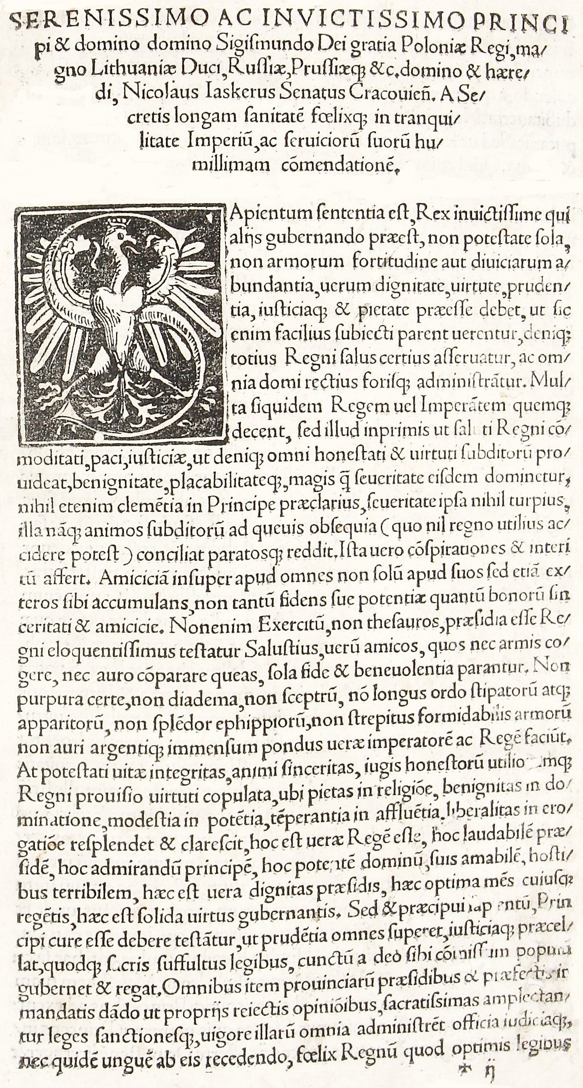 Dedykacja dla Zygmunta I Starego z Juris provincialis Saxonum vulgo nuncupatus libri tres dokonana przez Mikołaja Jaskra